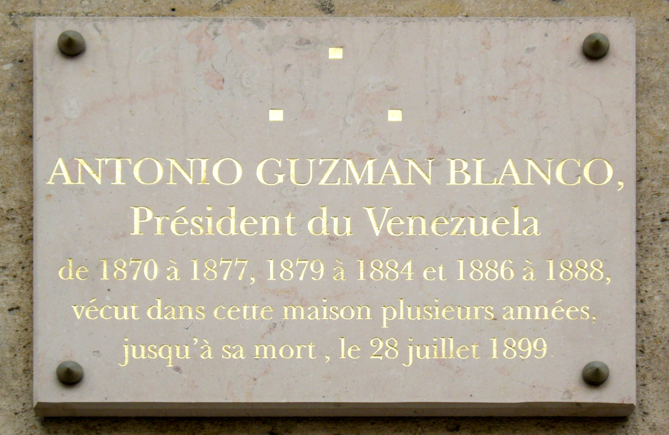 Plaque apposée au n° 27 de le rue La Pérouse, Paris 16e, où vécut pendant plusieurs années le président de Venezuela, Antonio Guzmán Blanco (1829-1899), et où il mourut le 28 juillet 1899.